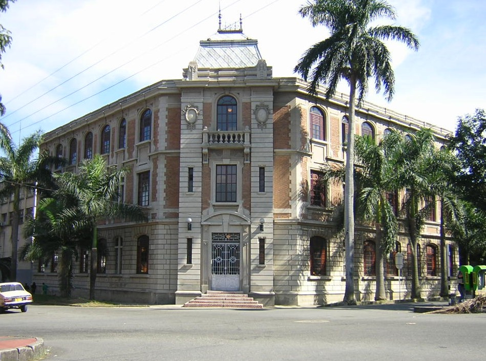 Facultad de Medicina, área de la Salud, Universidad de Antioquia, Medellín, Colombia (esta foto la tome yo, y la libero al dominio público)